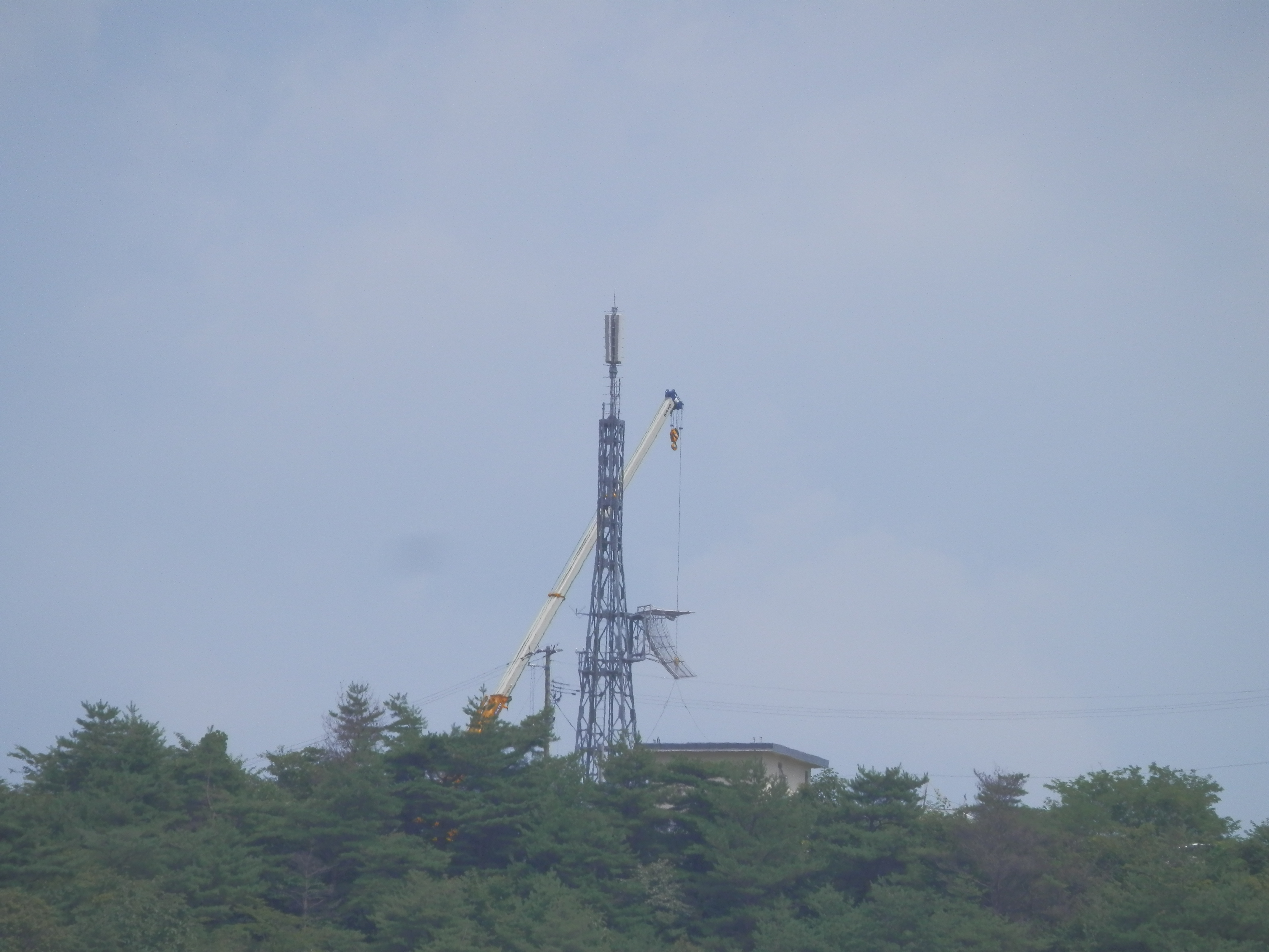 栗駒テレビ中継局 アナログ設備撤去風景(アンテナ撤去後)